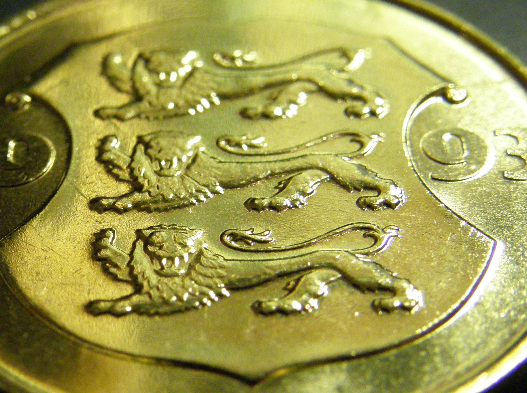 5-kroonine münt (1993). Detail aversilt